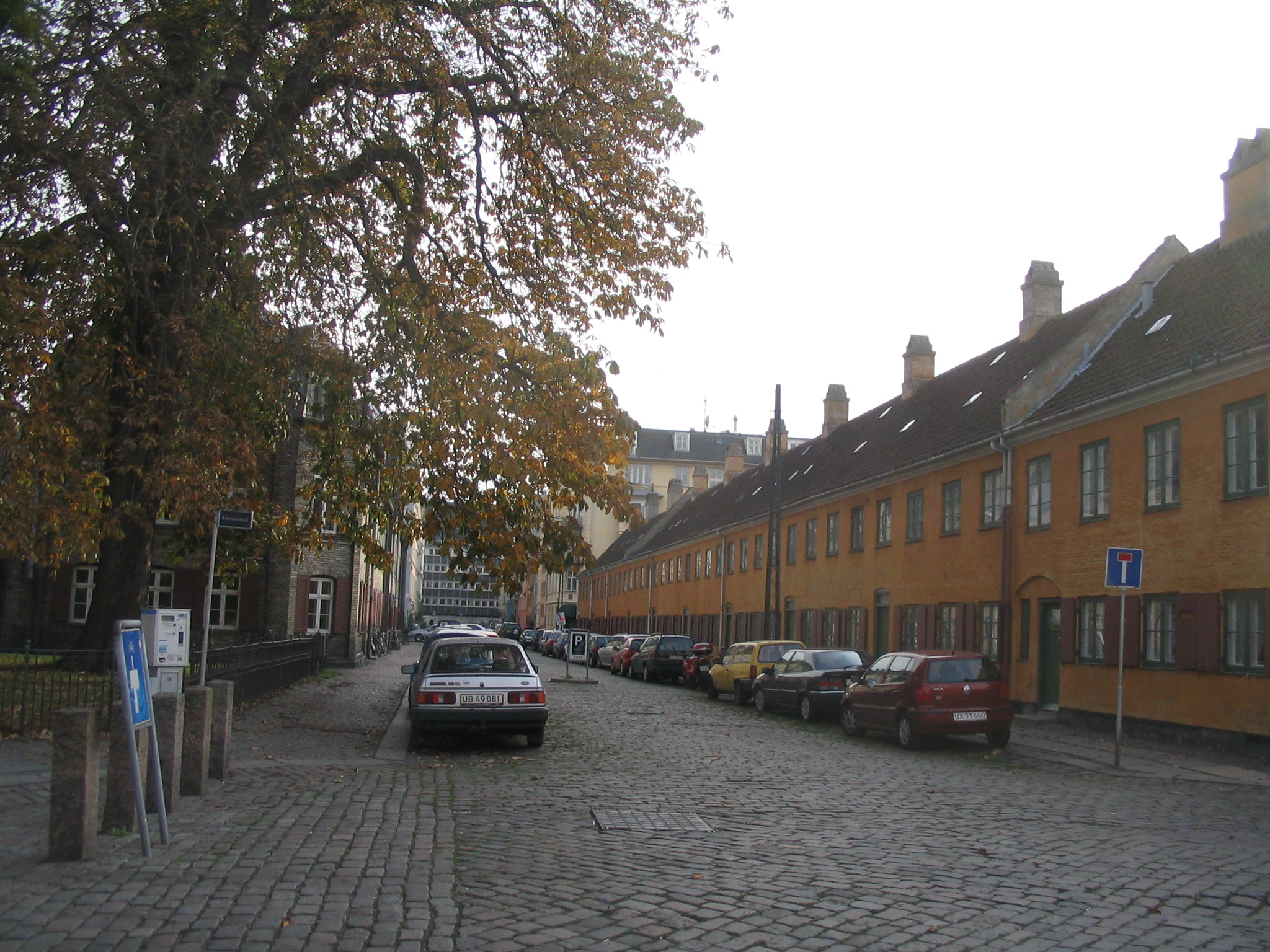 Sankt Pauls Gade at Nyboder in Copenhagen, Denmark